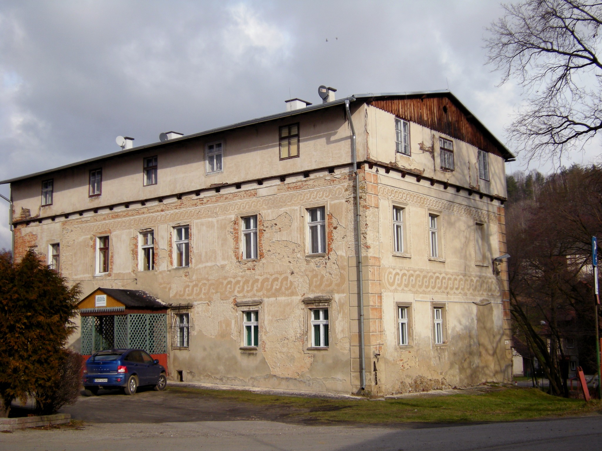 Gierałcice dwór, XVII, k. XIX w 05.1965.